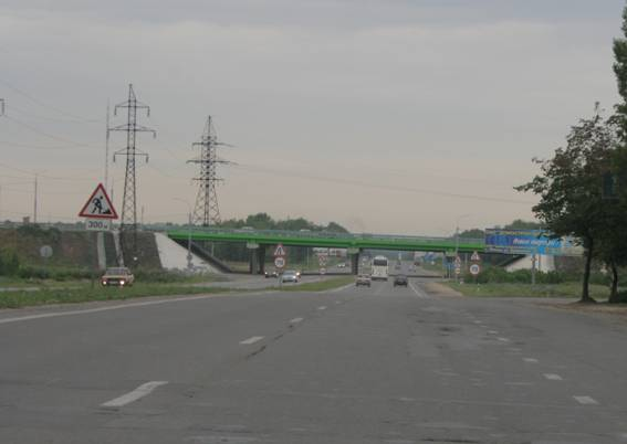 Липецк, Лебедянское шоссе